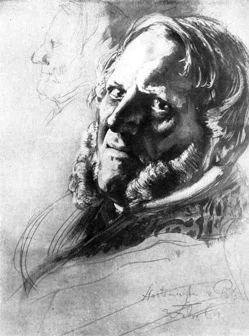 Robert von Patow. (Adolf Friedrich Erdmann von Menzel: Studie zum Krönungsbild Wilhelm I. (Porträt Bleistift, Wasser- und Deckfarben, auf graubraunem Papier 29,4 × 22,3 cm, 1865)